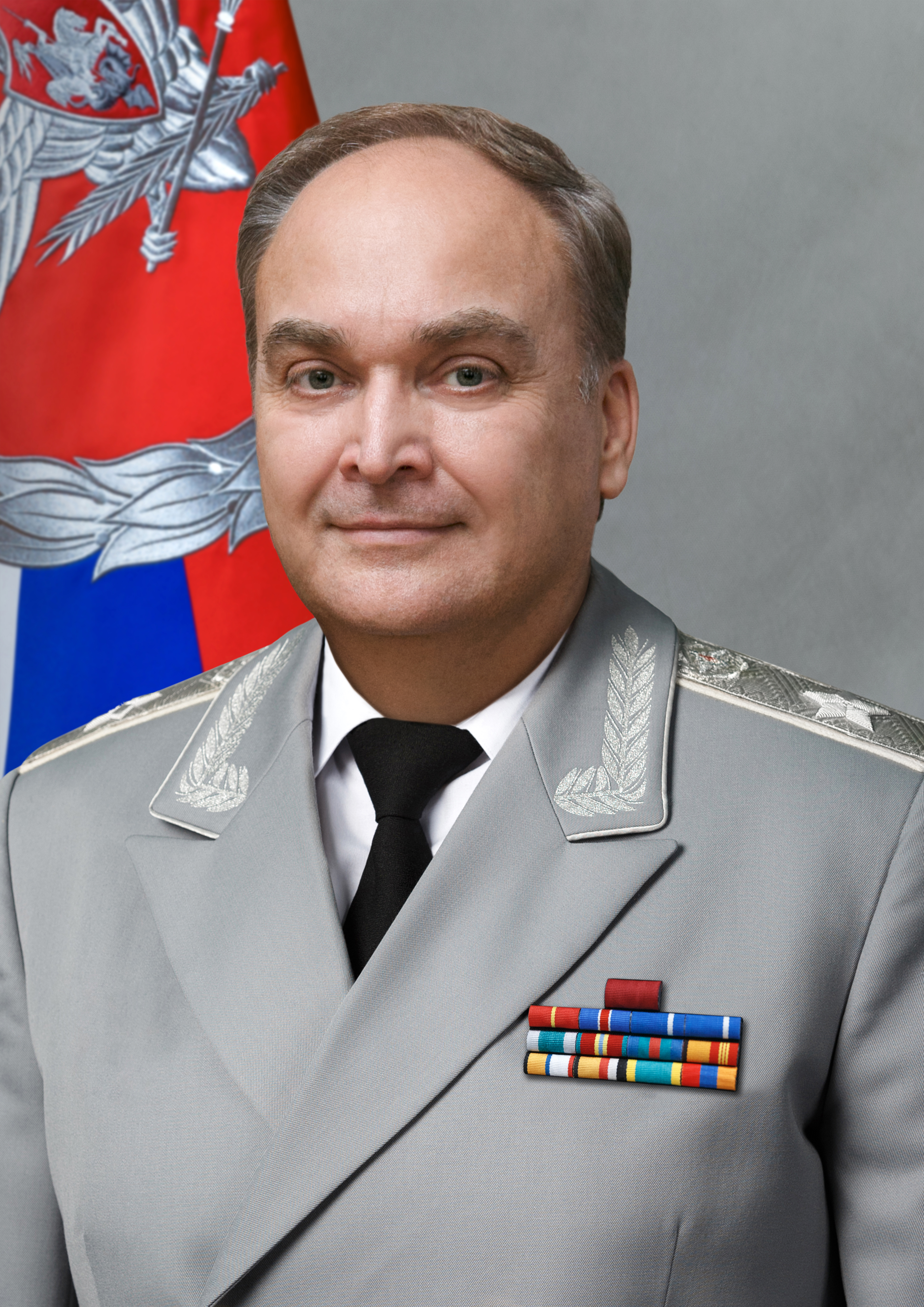 Заместитель Министра обороны Российской Федерации Антонов Анатолий Иванович